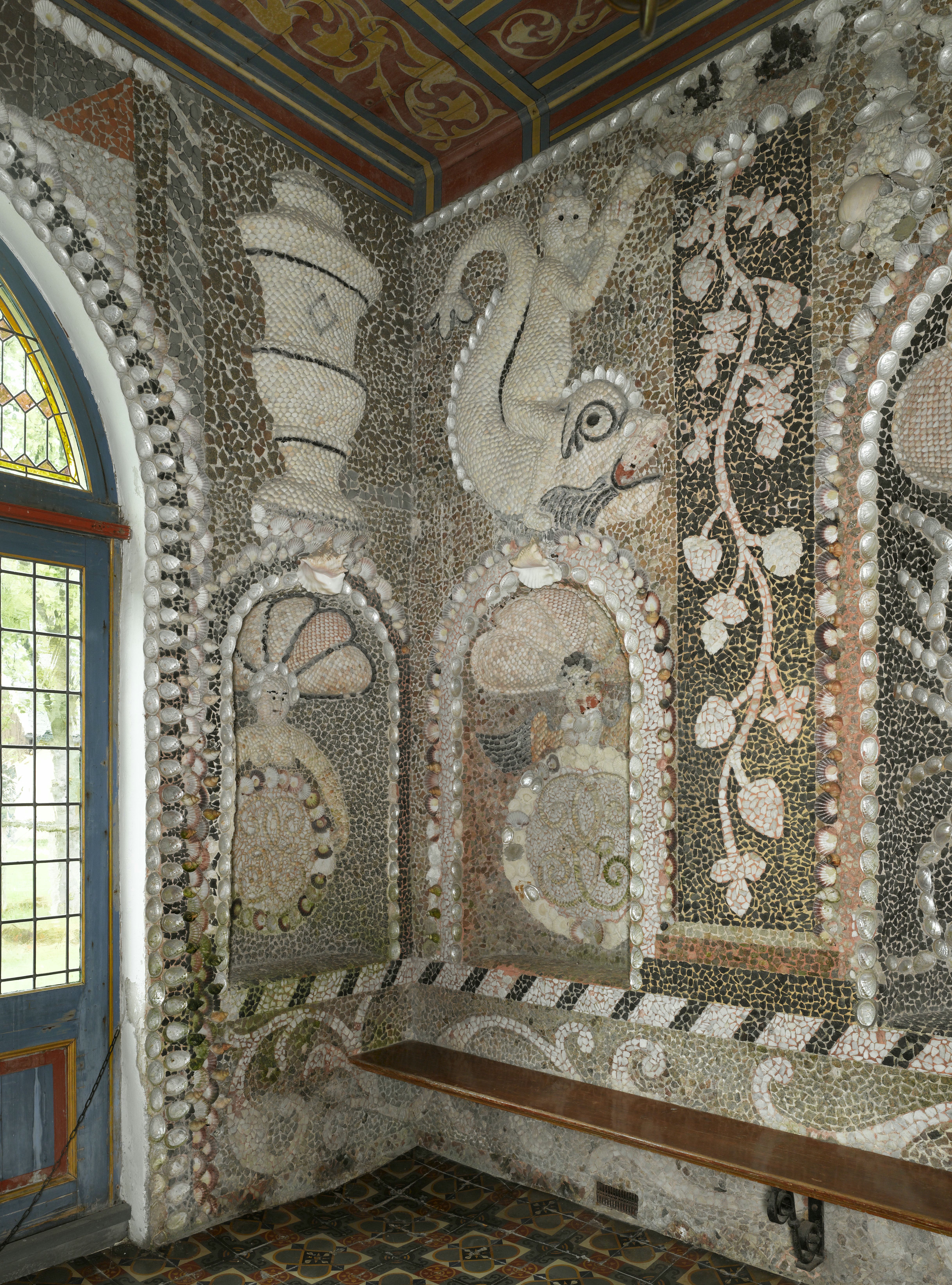 De Nienoord: Interieur tuinkoepel, overzicht van de hoek linksvoor, behandeld als schelpengrot